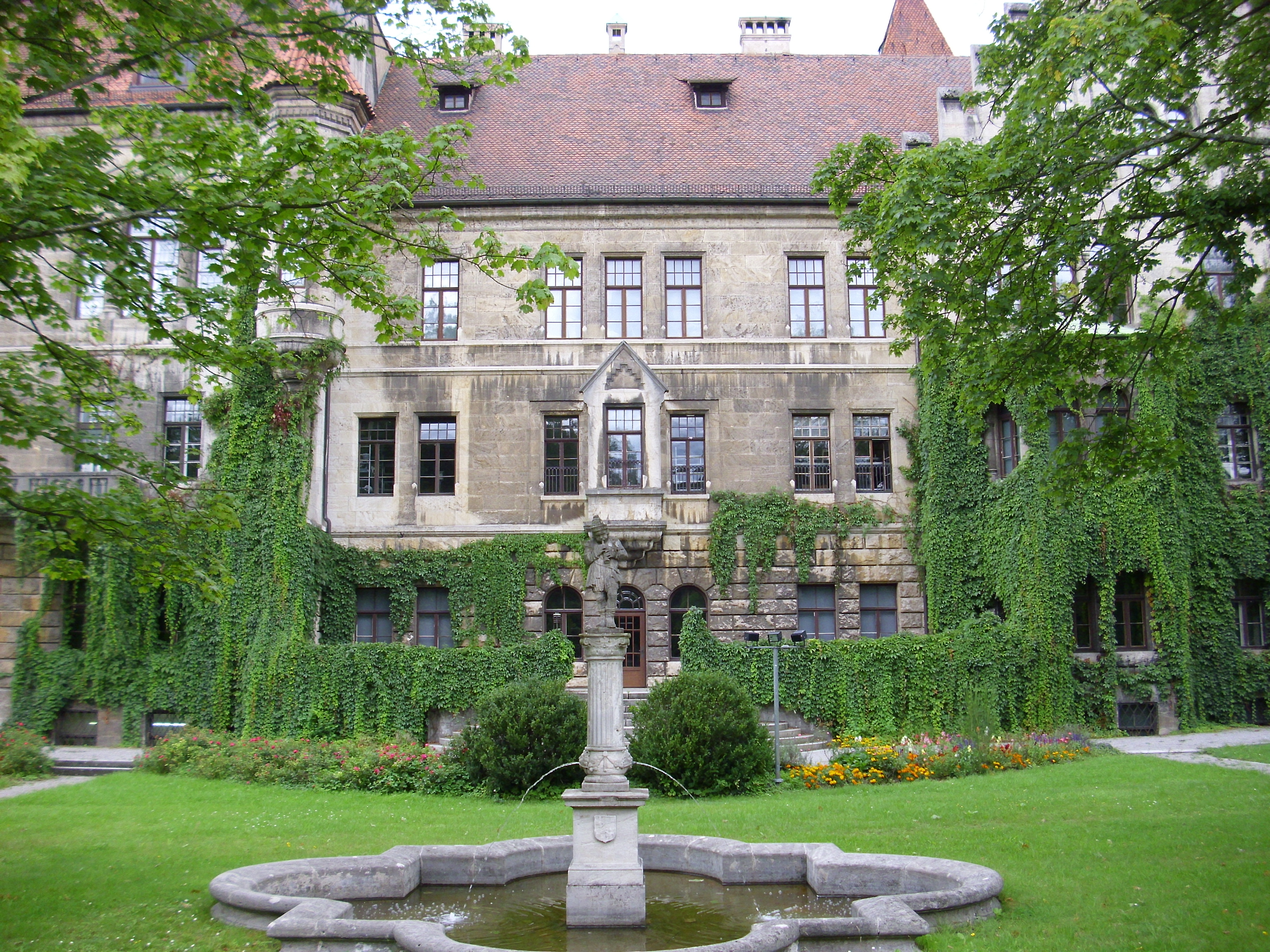 Faberschloss mit Park und anliegenden Villen Ende August 2010 19